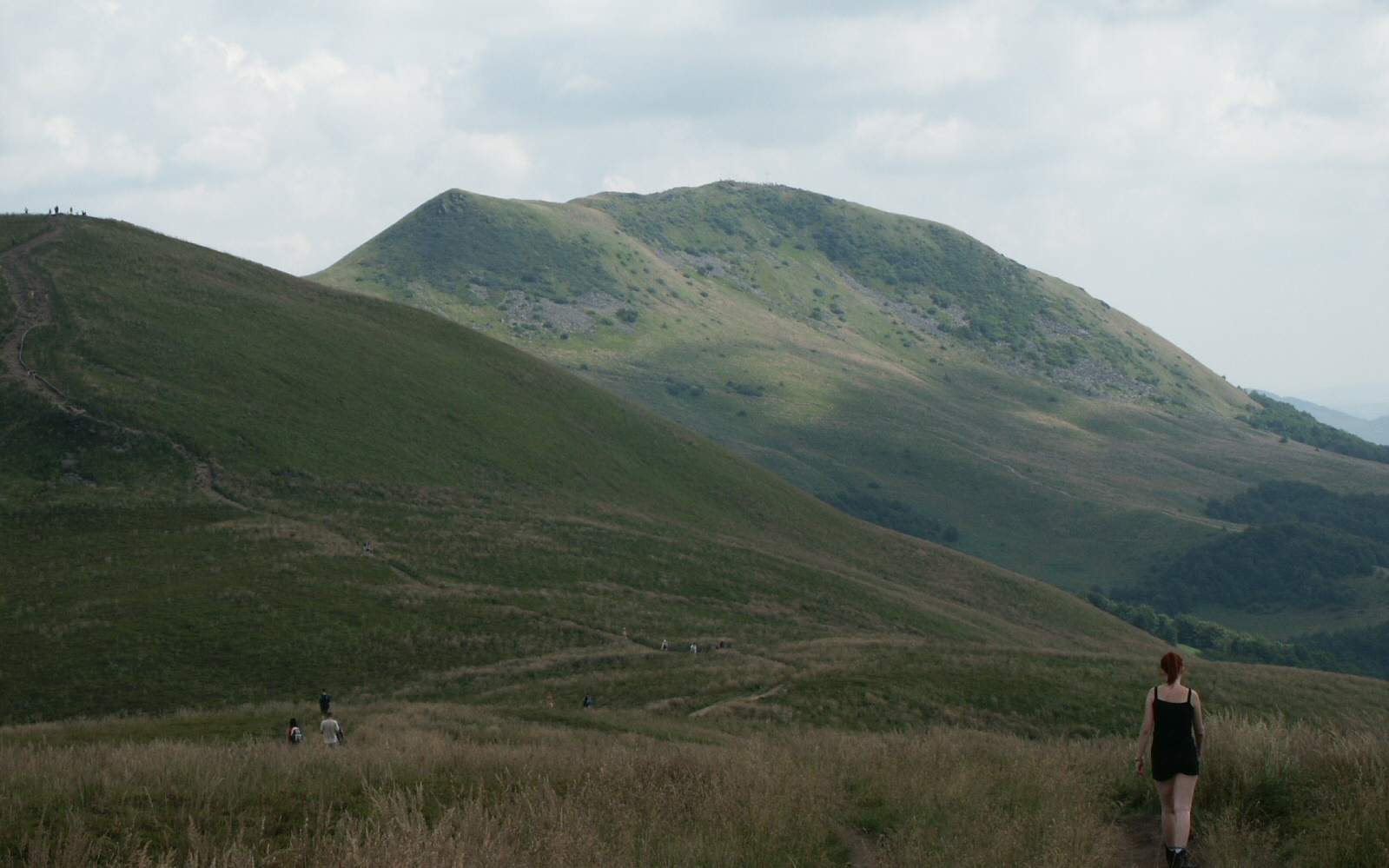 Widok szczytu Tarnicy od strony Szerokiego Wierchu.